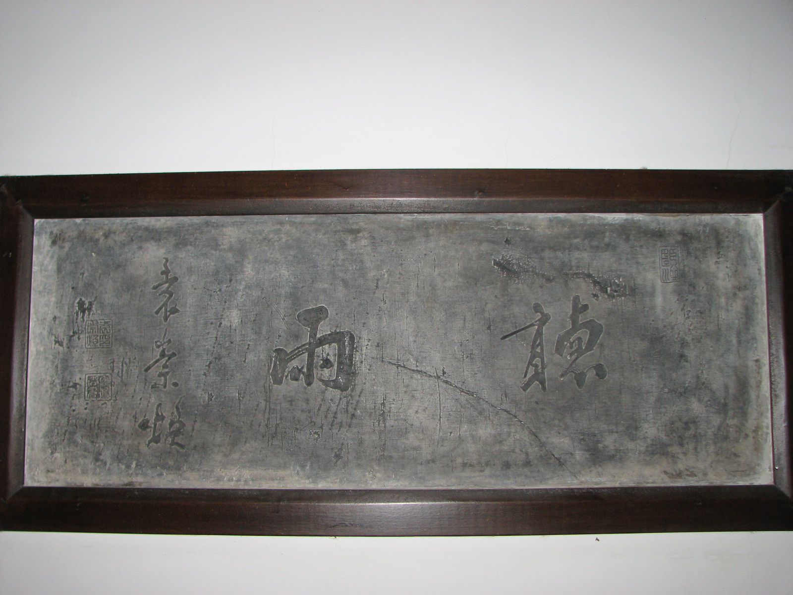 在北京袁崇焕纪念堂，此为袁崇焕的“听雨”